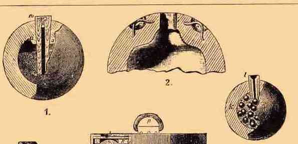 Разрывные артиллерийские снаряды XVII-XIX веков: граната, бомба, картечная граната